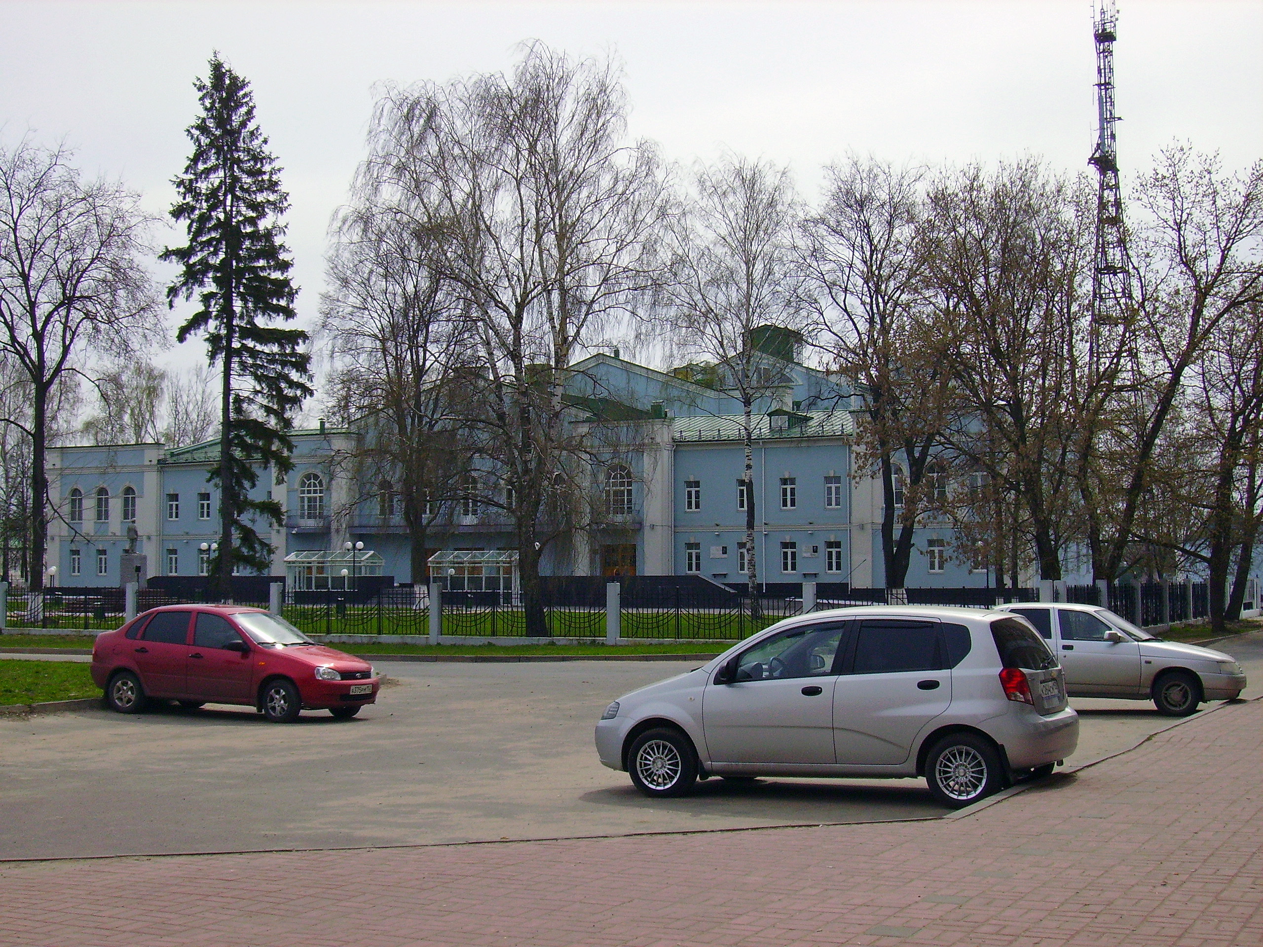 Выкса. Дворец культуры металлургов